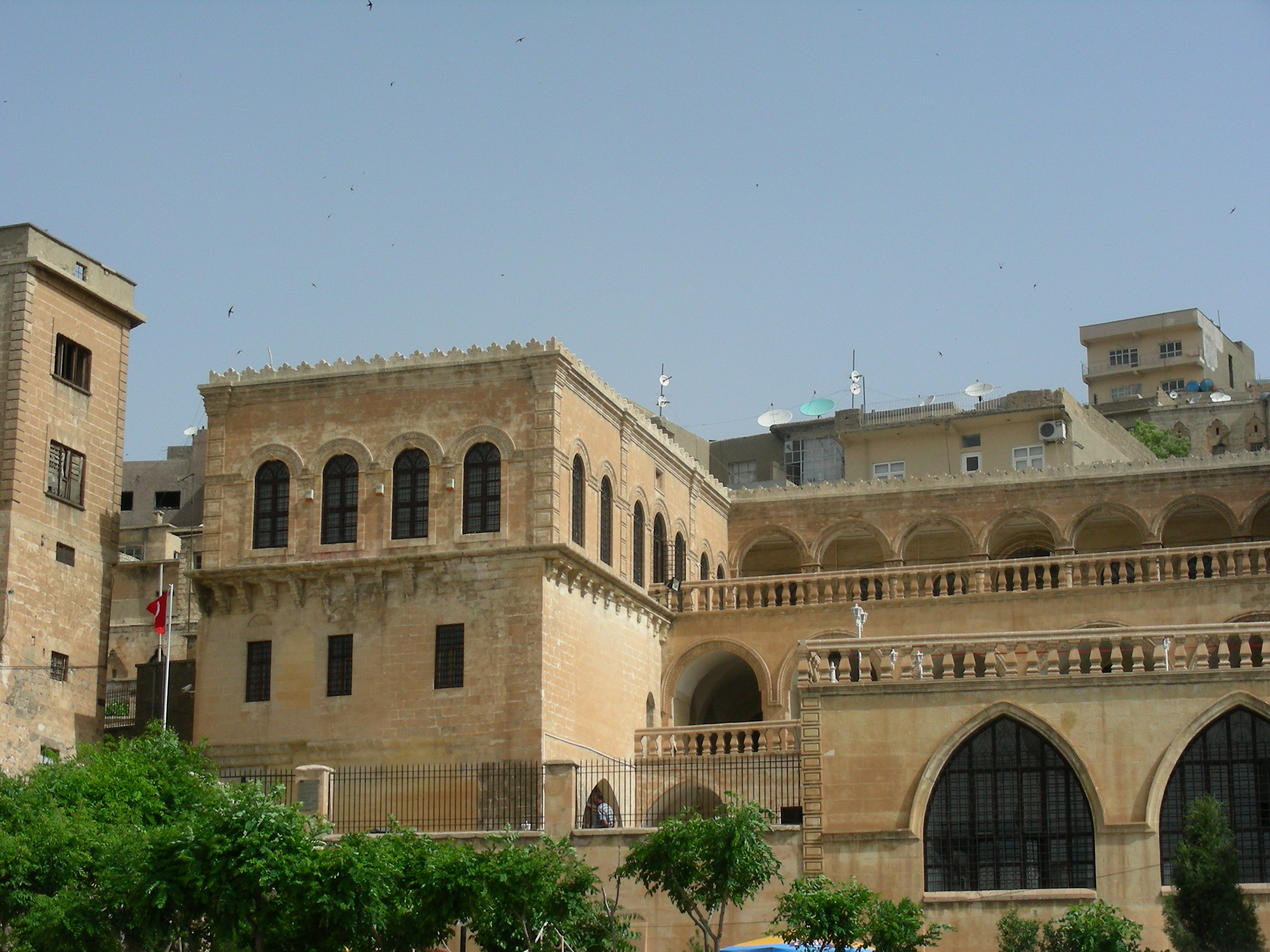 Mardin